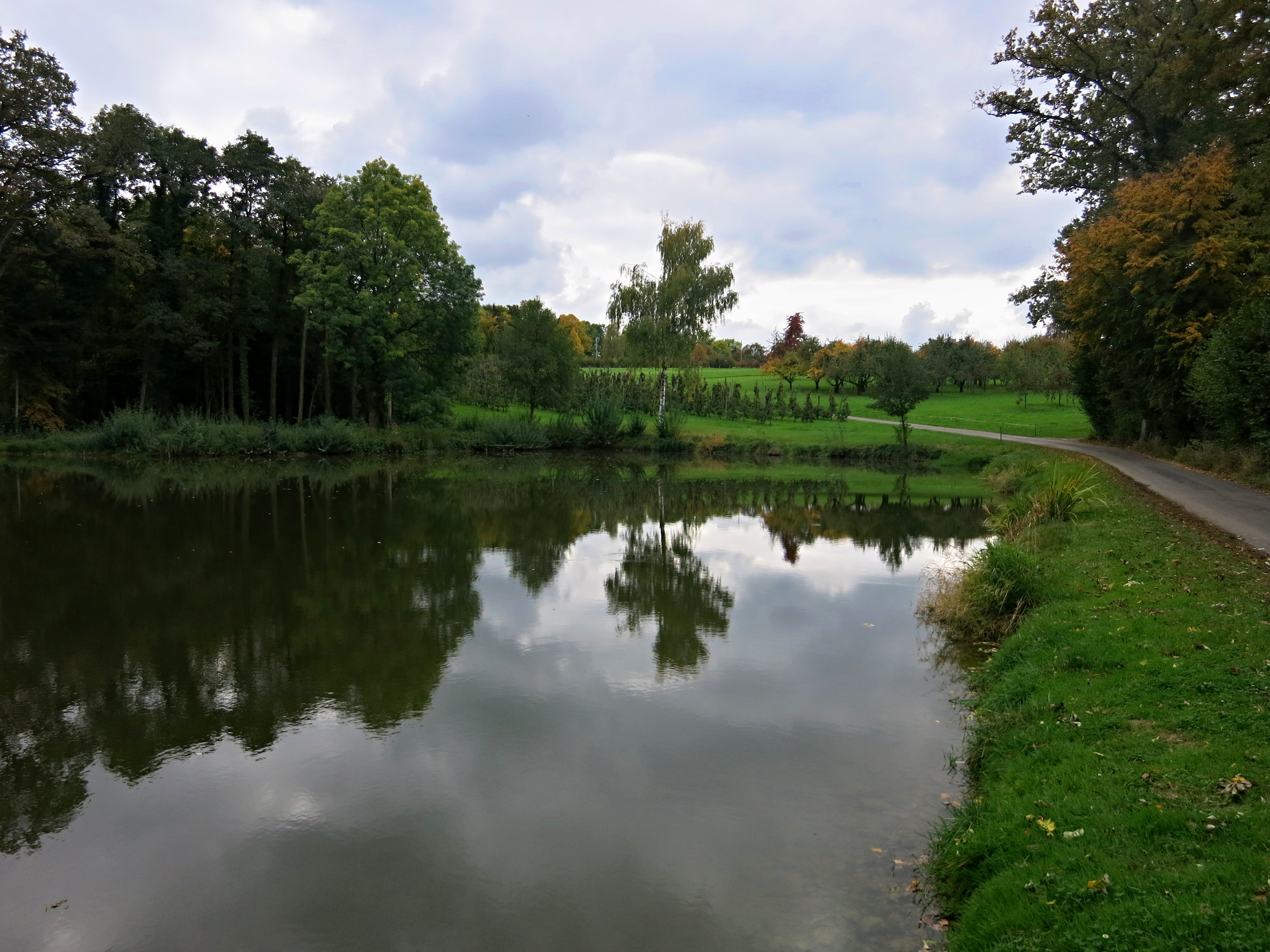 Balgerweier